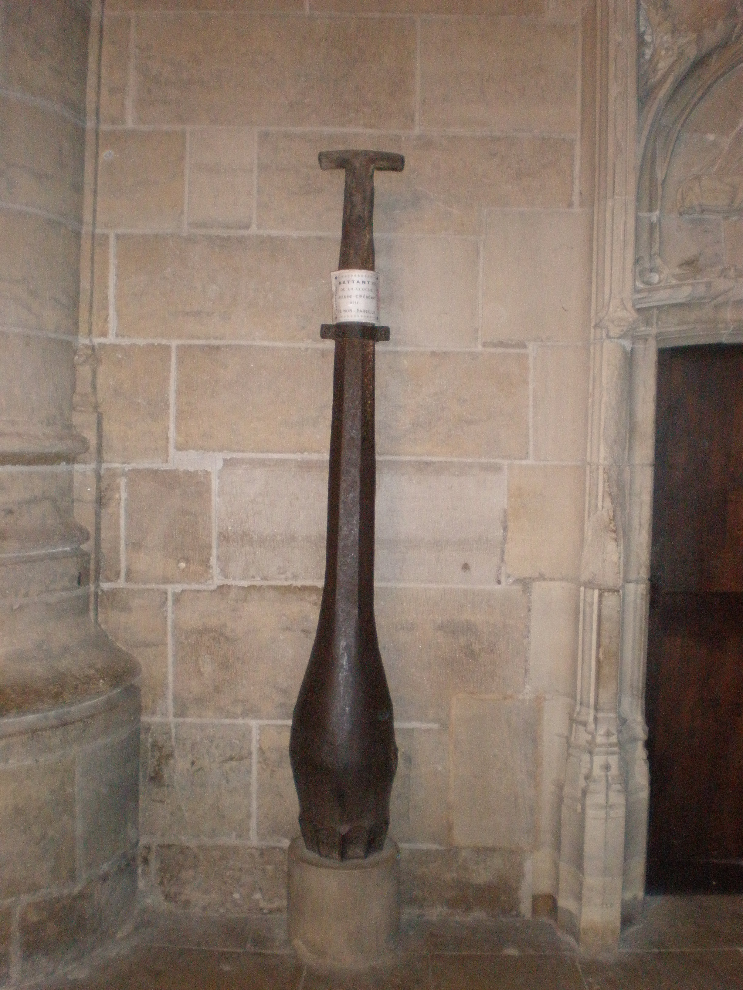 Le battant de l'ancienne cloche la "Non-Pareille", dans la cathédrale de Mende